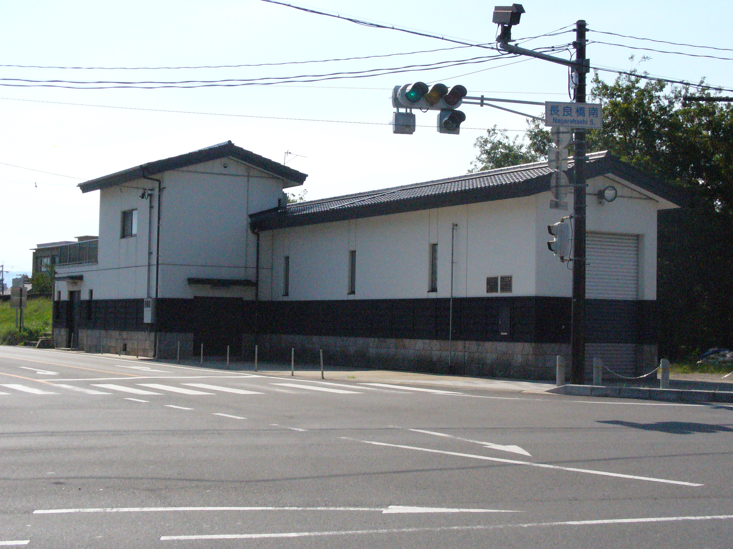 Nagarabashi Gate 大宮陸閘（長良橋陸閘）,Gifu,Gifu,Japan（岐阜県岐阜市）で撮影。